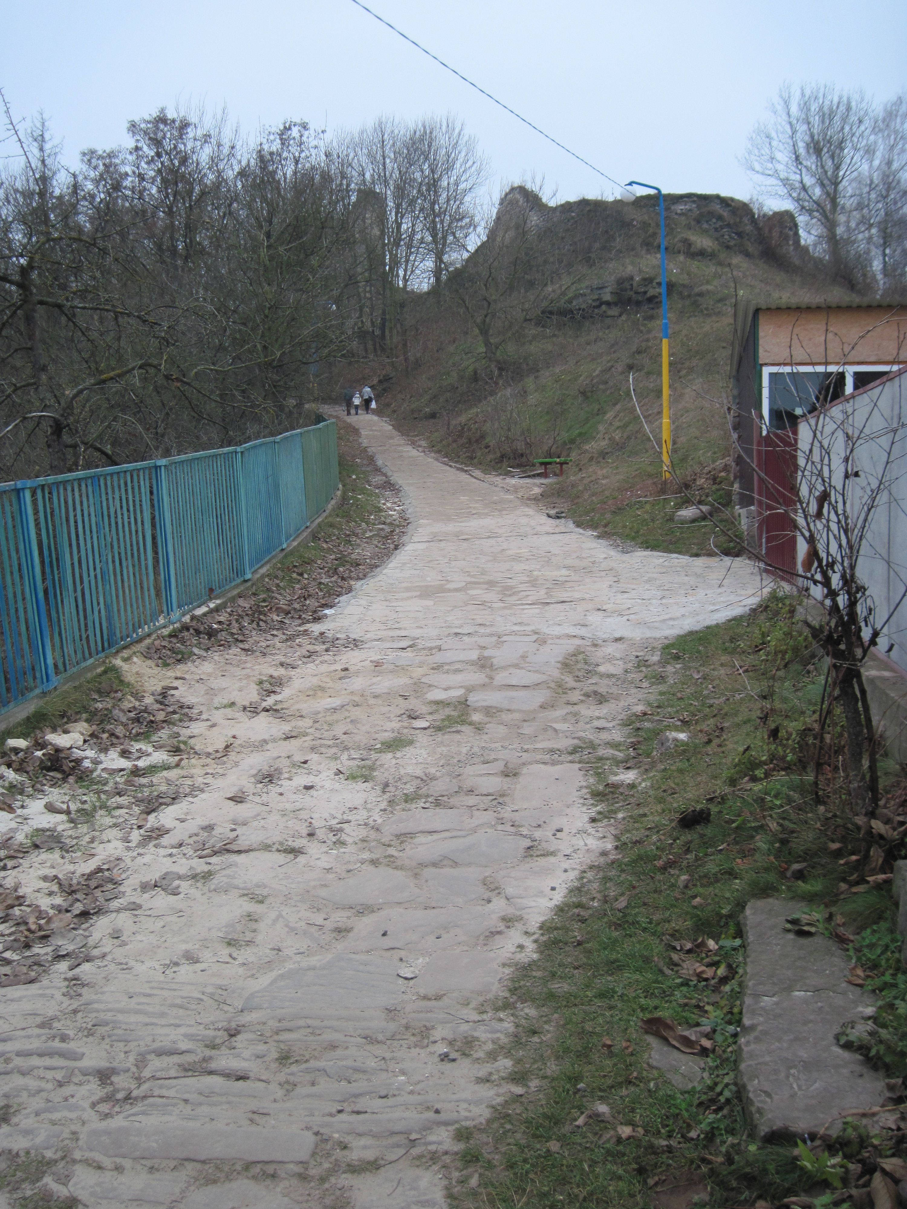 стара та нова доріжки до замку, листопад 2014